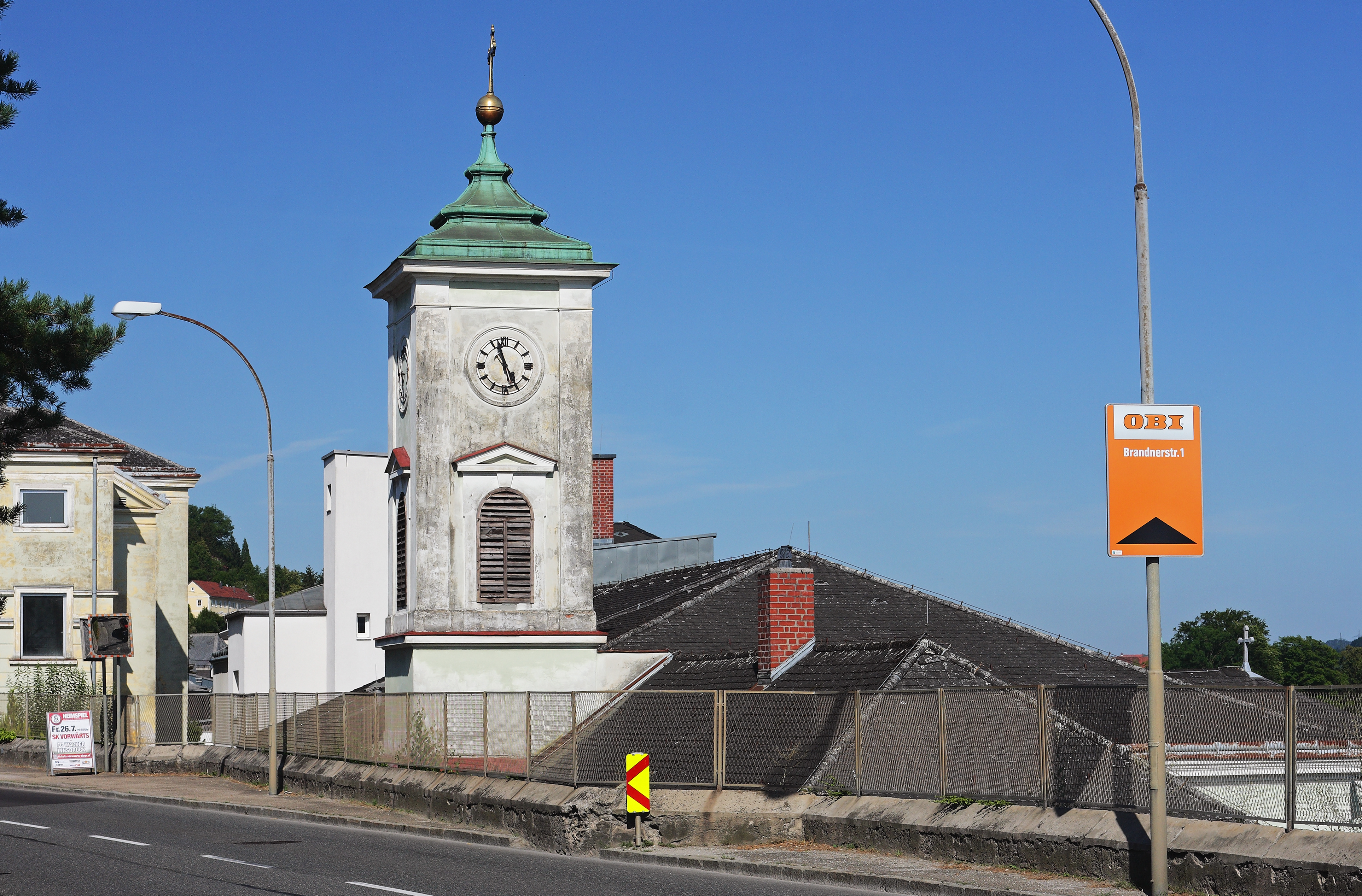 Der Turm der Annakapelle in Steyr, gesehen von der Sierninger Straße (B 122)